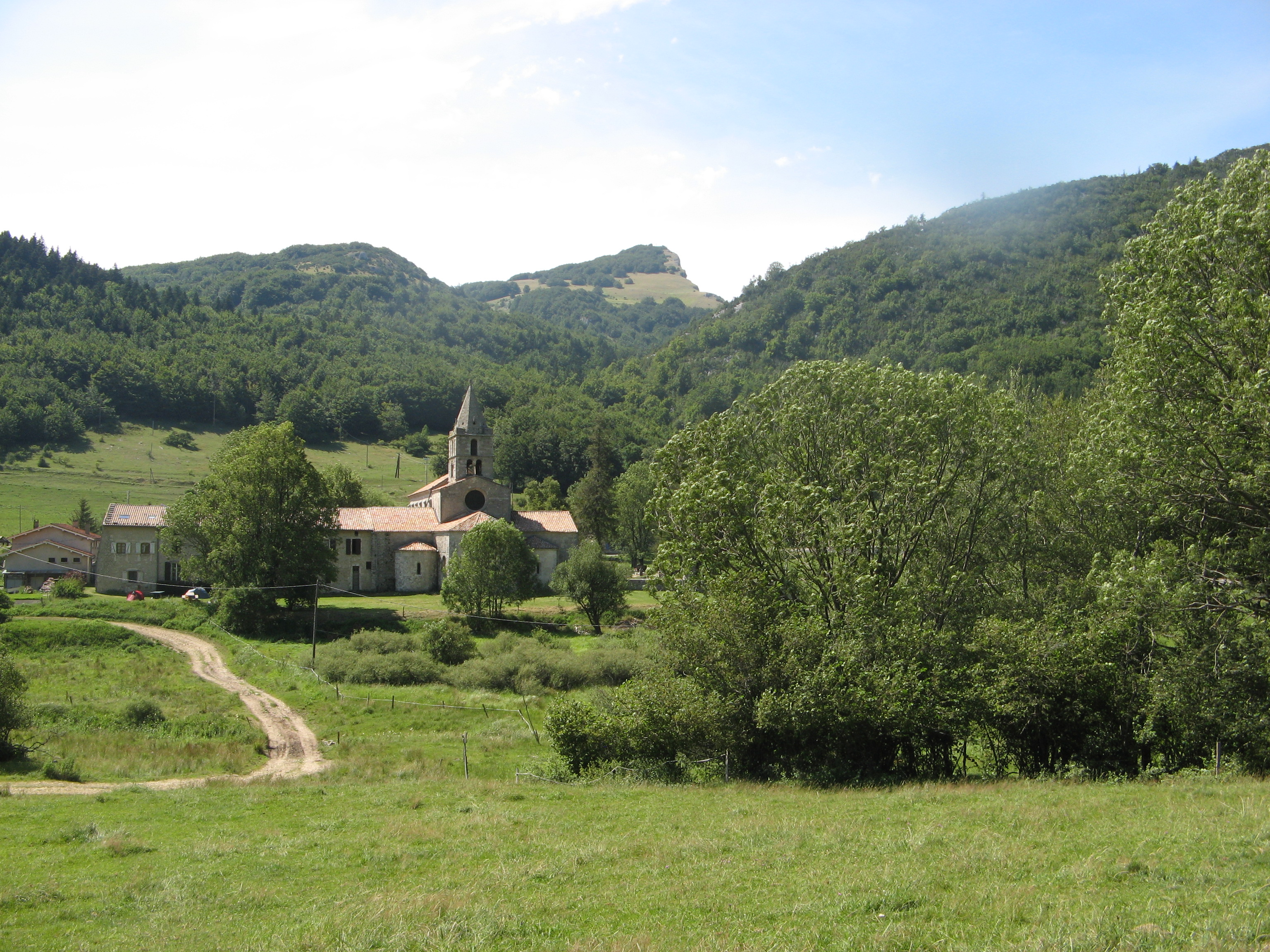 Paysage du Vercors avec l'abbatiale de Léoncel (fondée au XIIème siècle) France, département de la Drôme